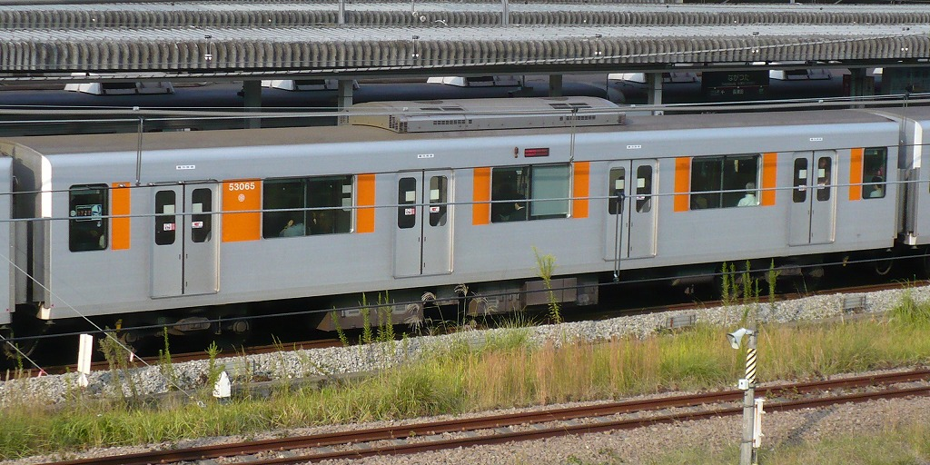 東武50050系の車体側面